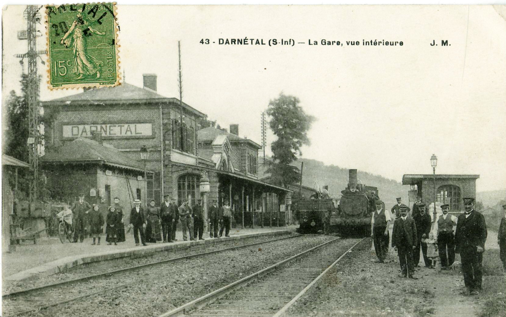 Carte postale ancienne éditée par JM, n°43 : DARNÉTAL - La Gare, vue intérieure